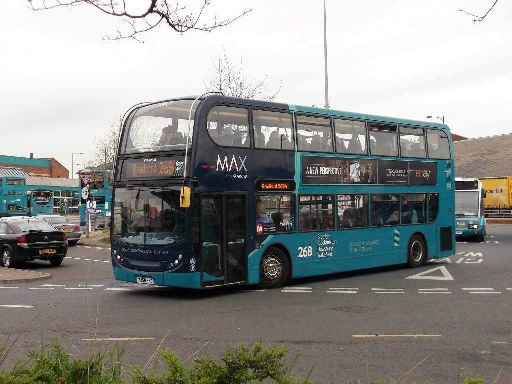 Arriva Max